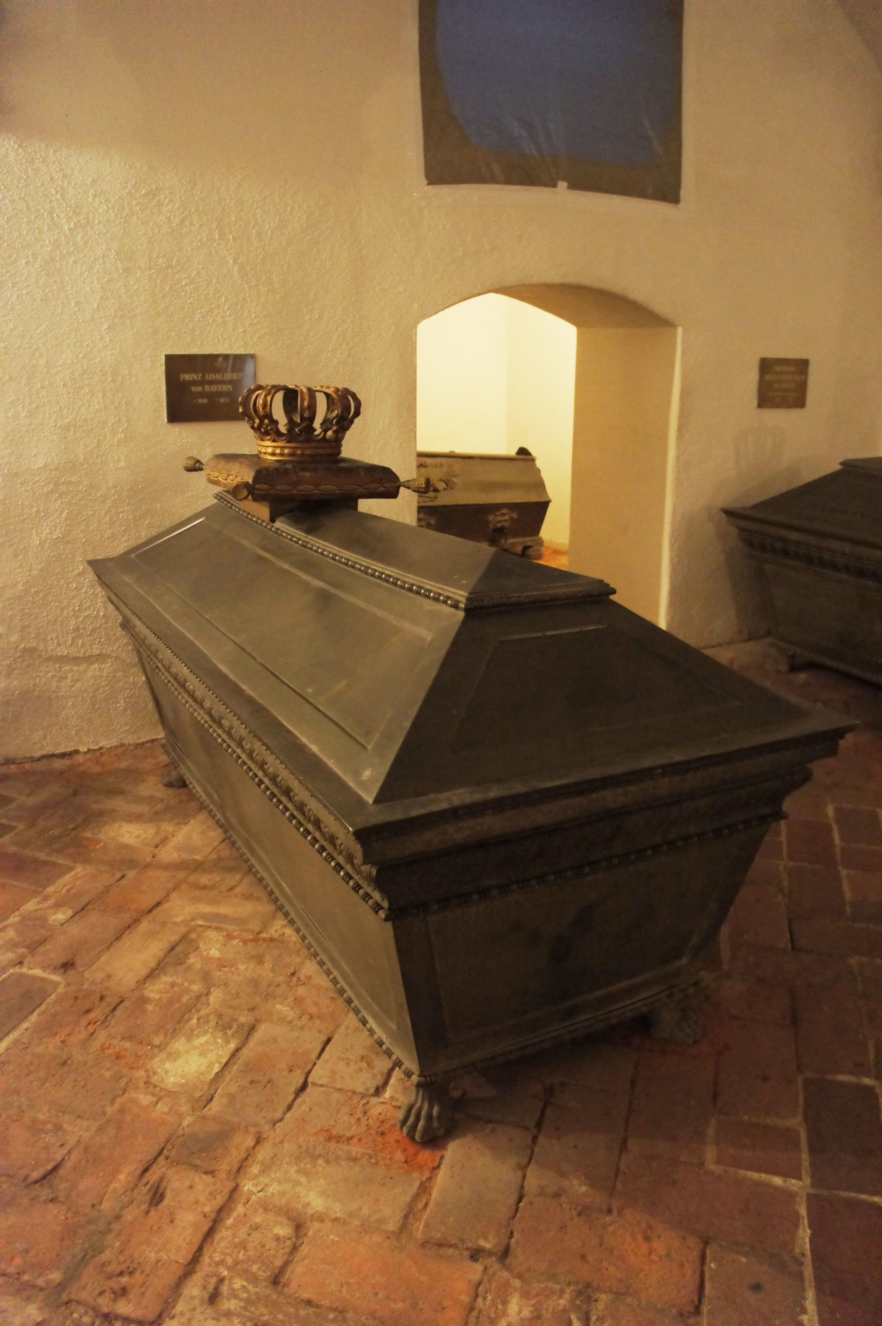 Prinz Adalbert Wilhelm (19. Juli 1828 – 21. September 1875) (Sohn von König Ludwig I.). Sarkophag in der Grablege der Wittelsbacher in der St. Michael Kirche in München.